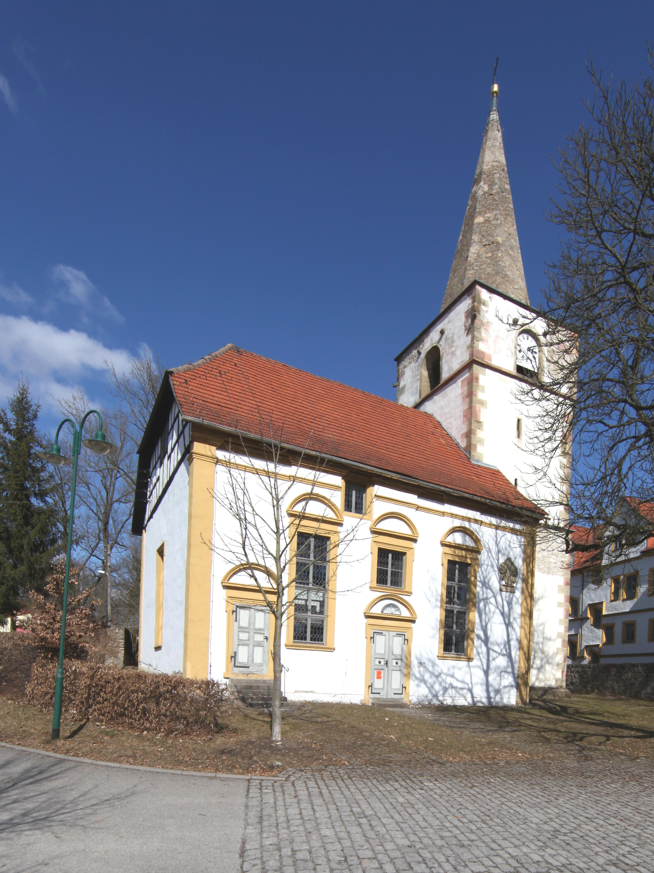 Evangelisch-Lutherische Kirche St. Mauritius in Marisfeld, Landkreis Hildburghausen